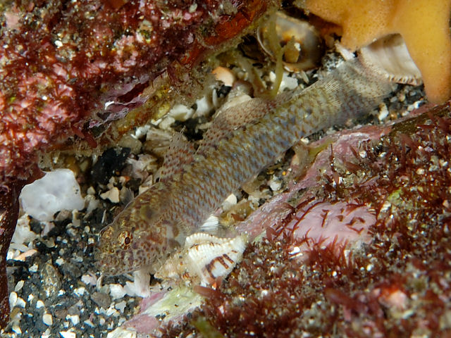 イソハゼ Eviota abax